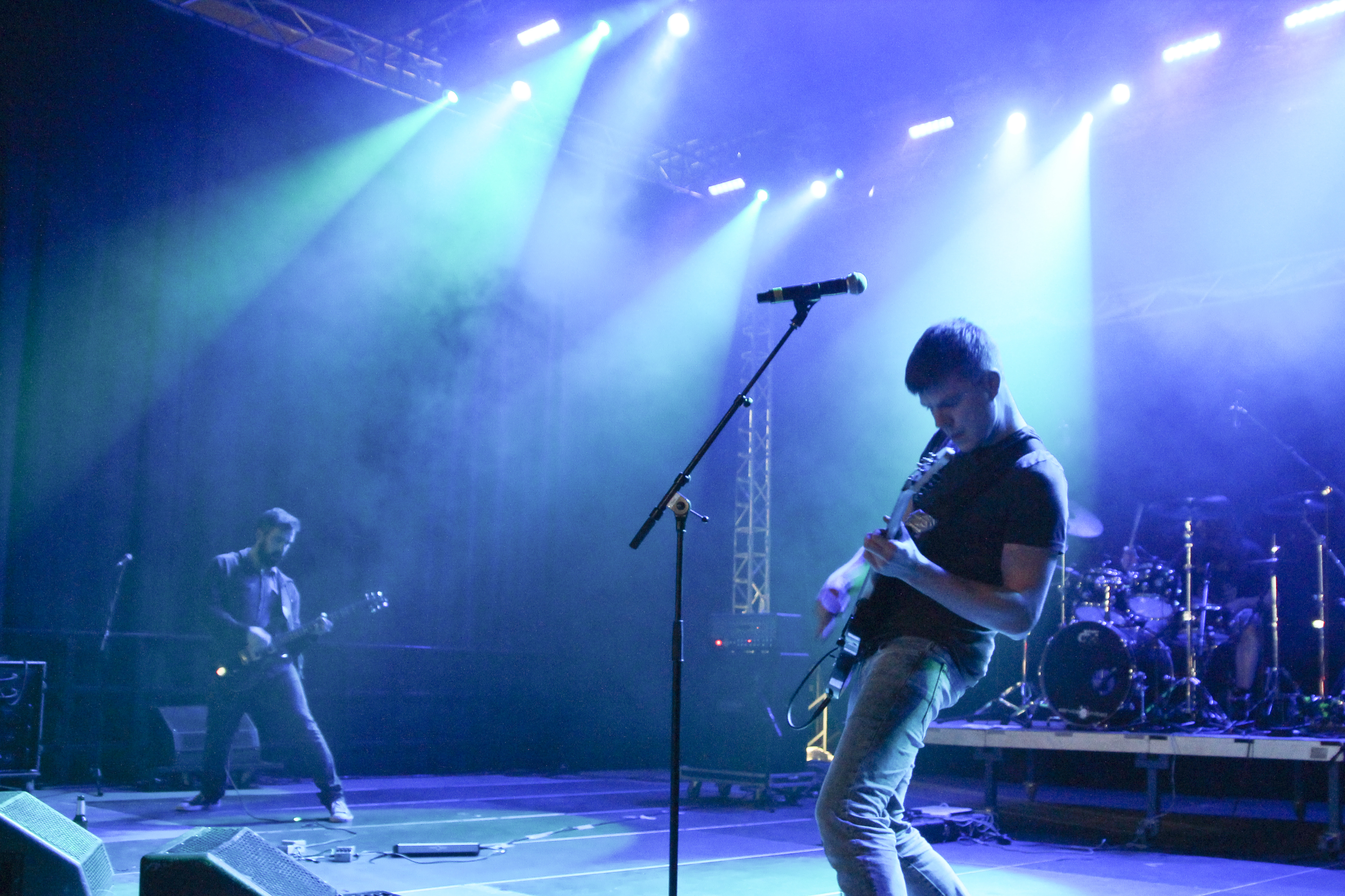 Altar of Plagues auf dem Wave-Gotik-Treffen 2013 in Leipzig, Kohlrabizirkus.